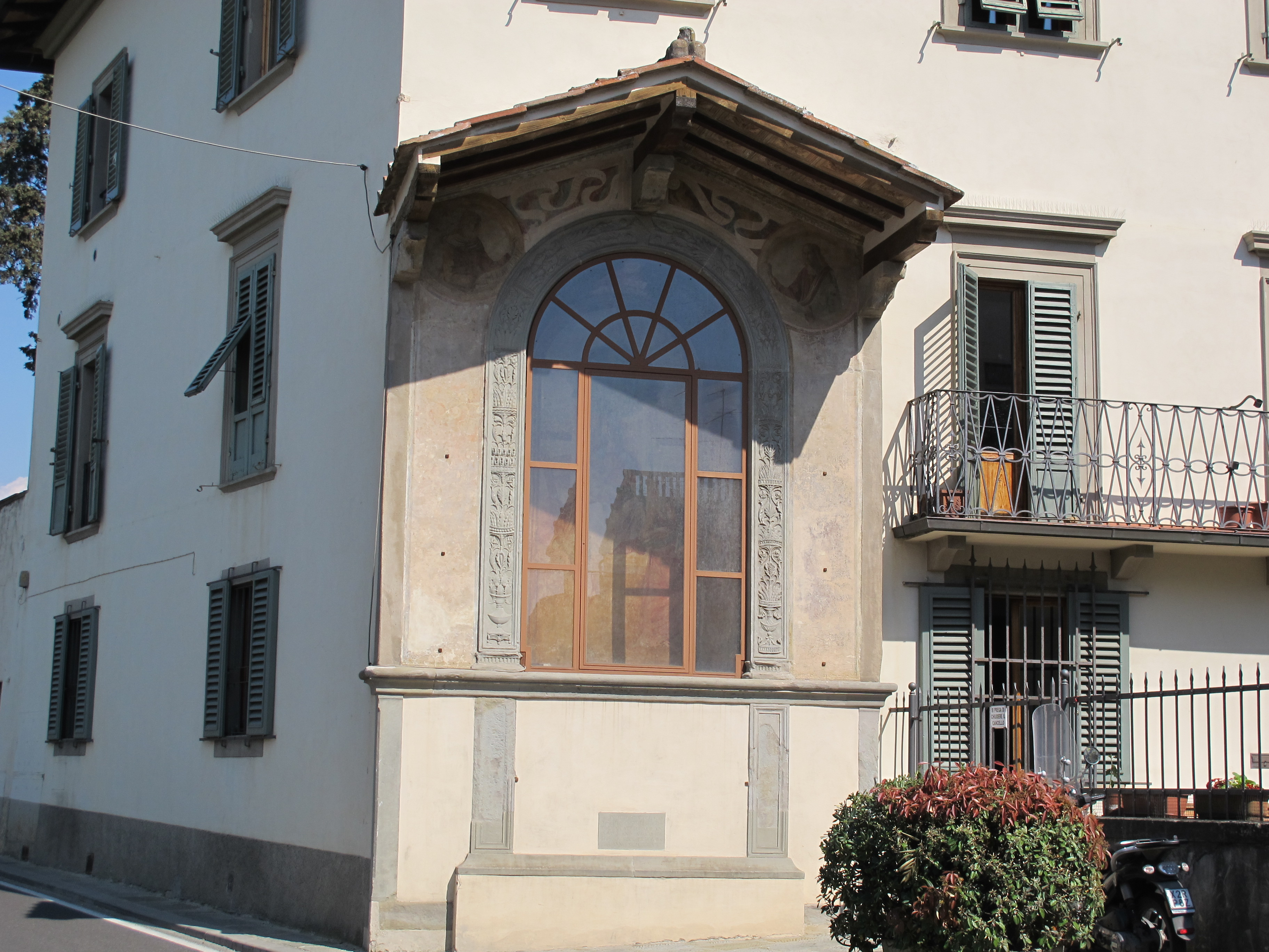 Tabernacolo del poggiarello